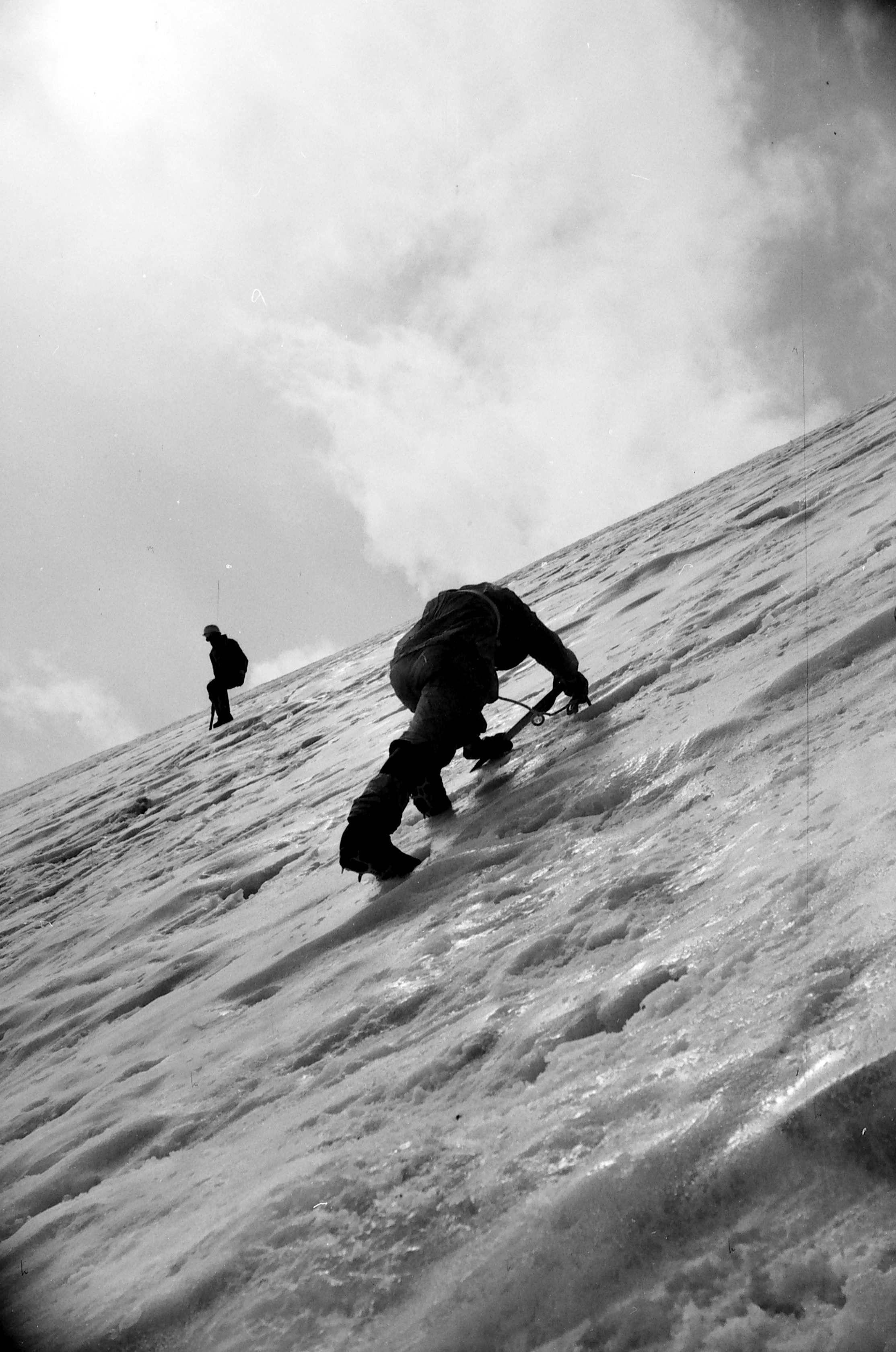 Ekspeditsioon mäetipule "Tartu Ülikool 350".